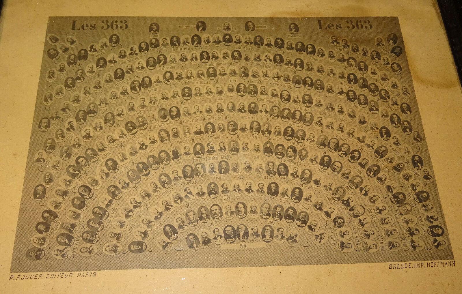 Manifeste des députés républicains français adopté lors de la crise politique du 16 mai 1877